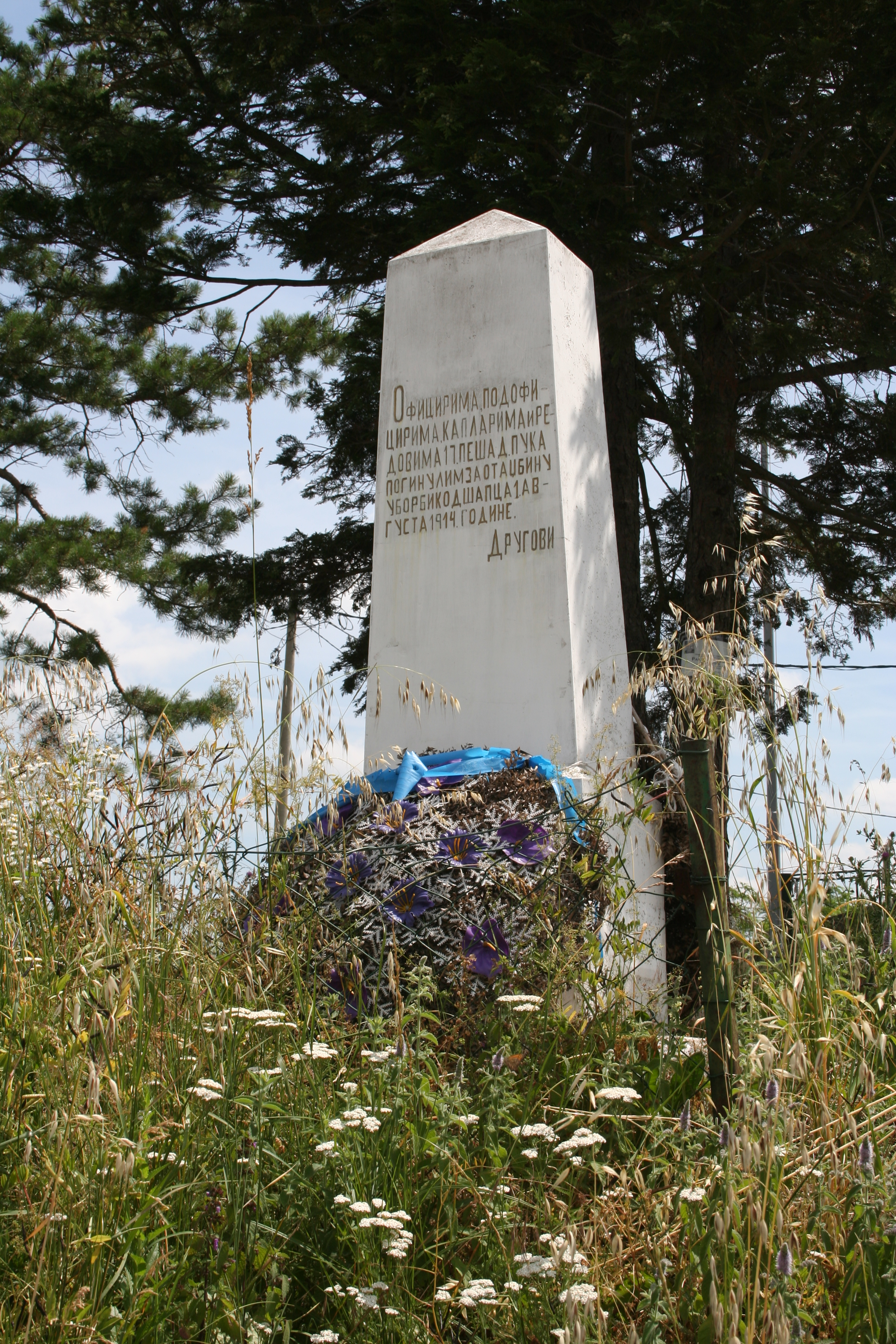 Mehovine, opština Vladimirci, spomen groblje poginulih ratnika 17. pešadijskog puka u Prvom svetskom ratu